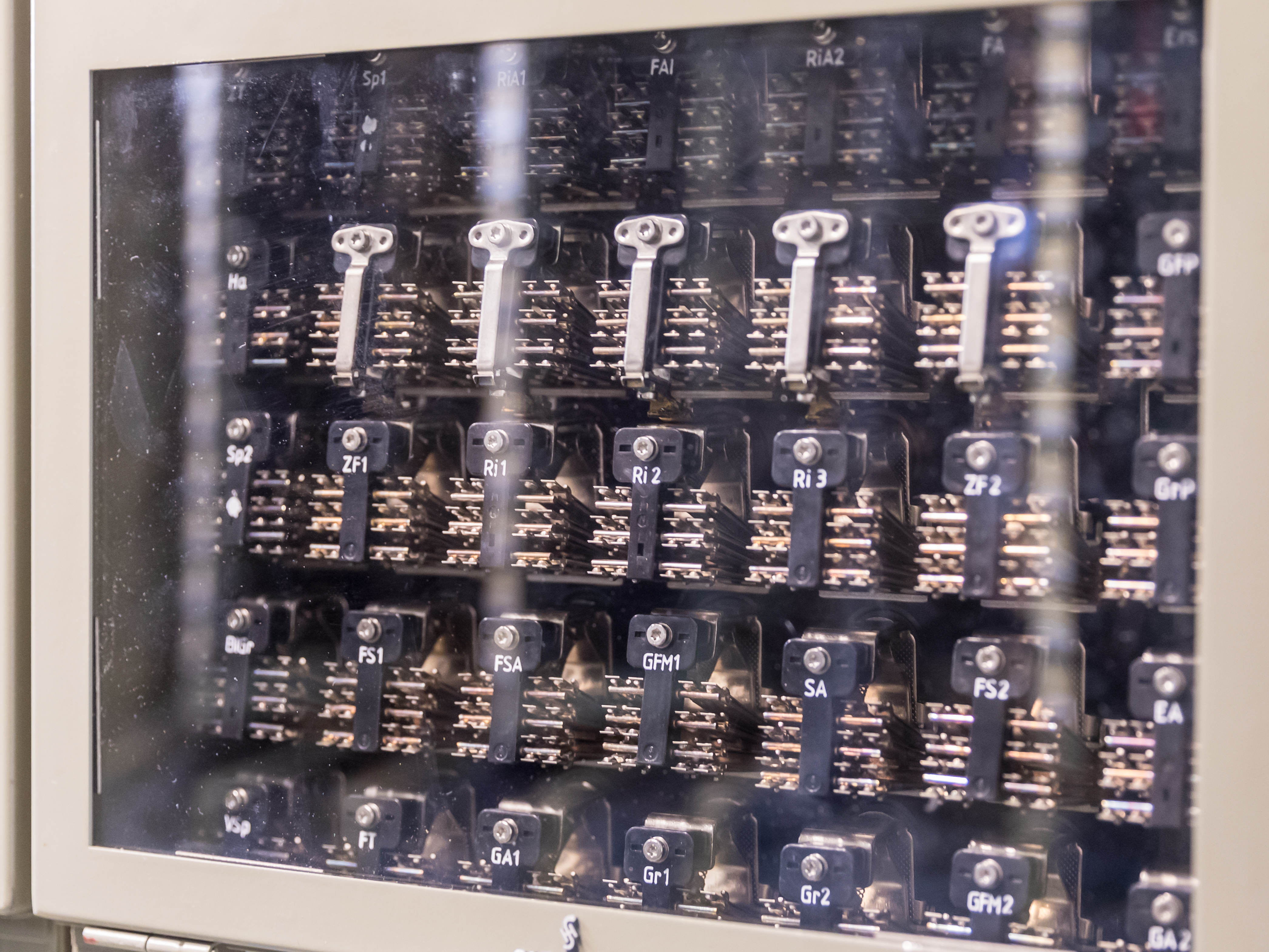 Technik Relaisstellwerk Köln Kf